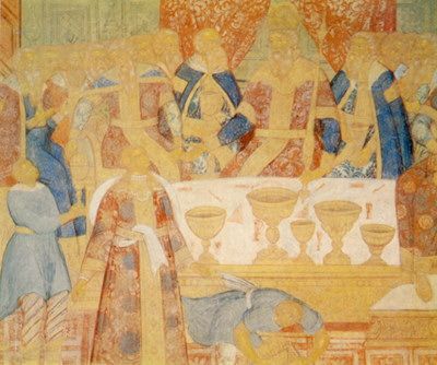 Пир Ирода. Фреска Софийского собора Вологды